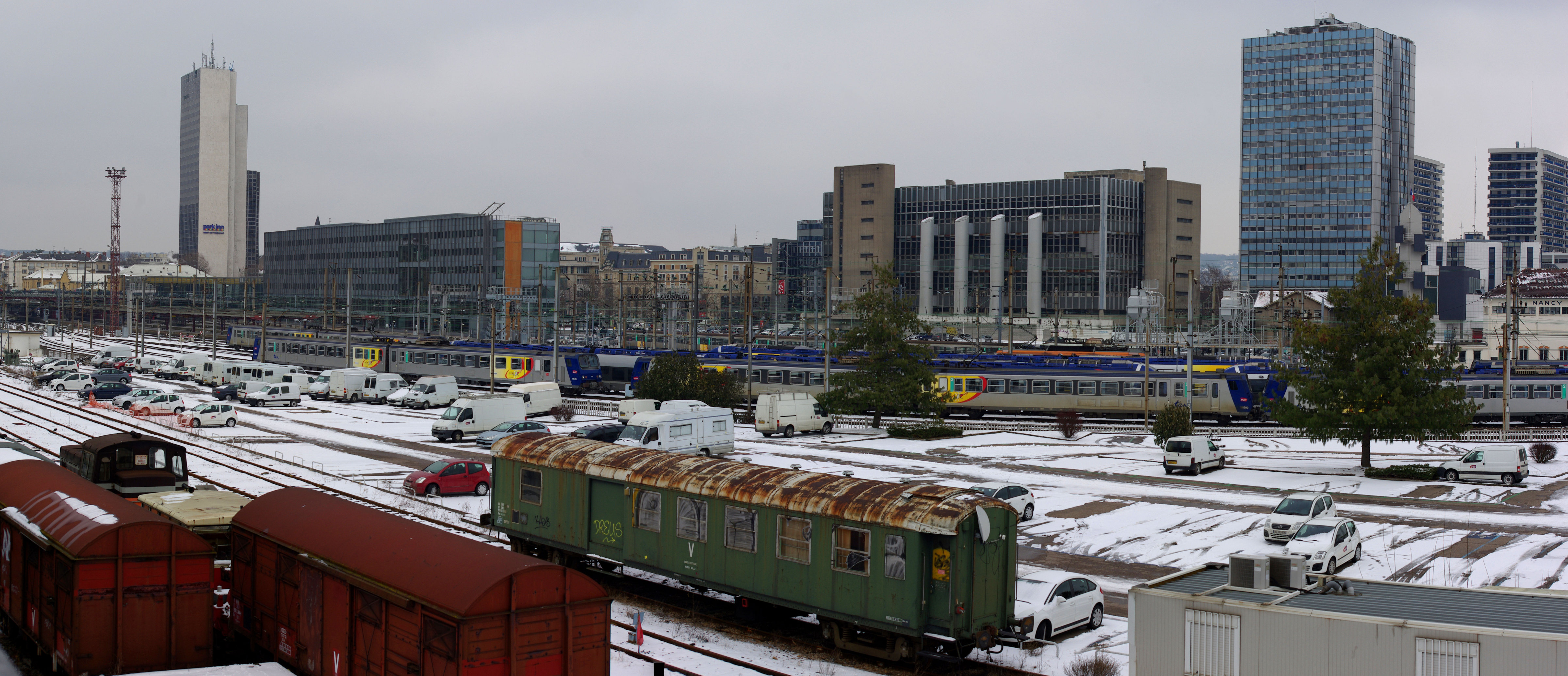 Nancy (Meurthe-et-Moselle, France), centre gare depuis le viaduc Kennedy, vue sur le centre de tri postal, immeuble République (2010)